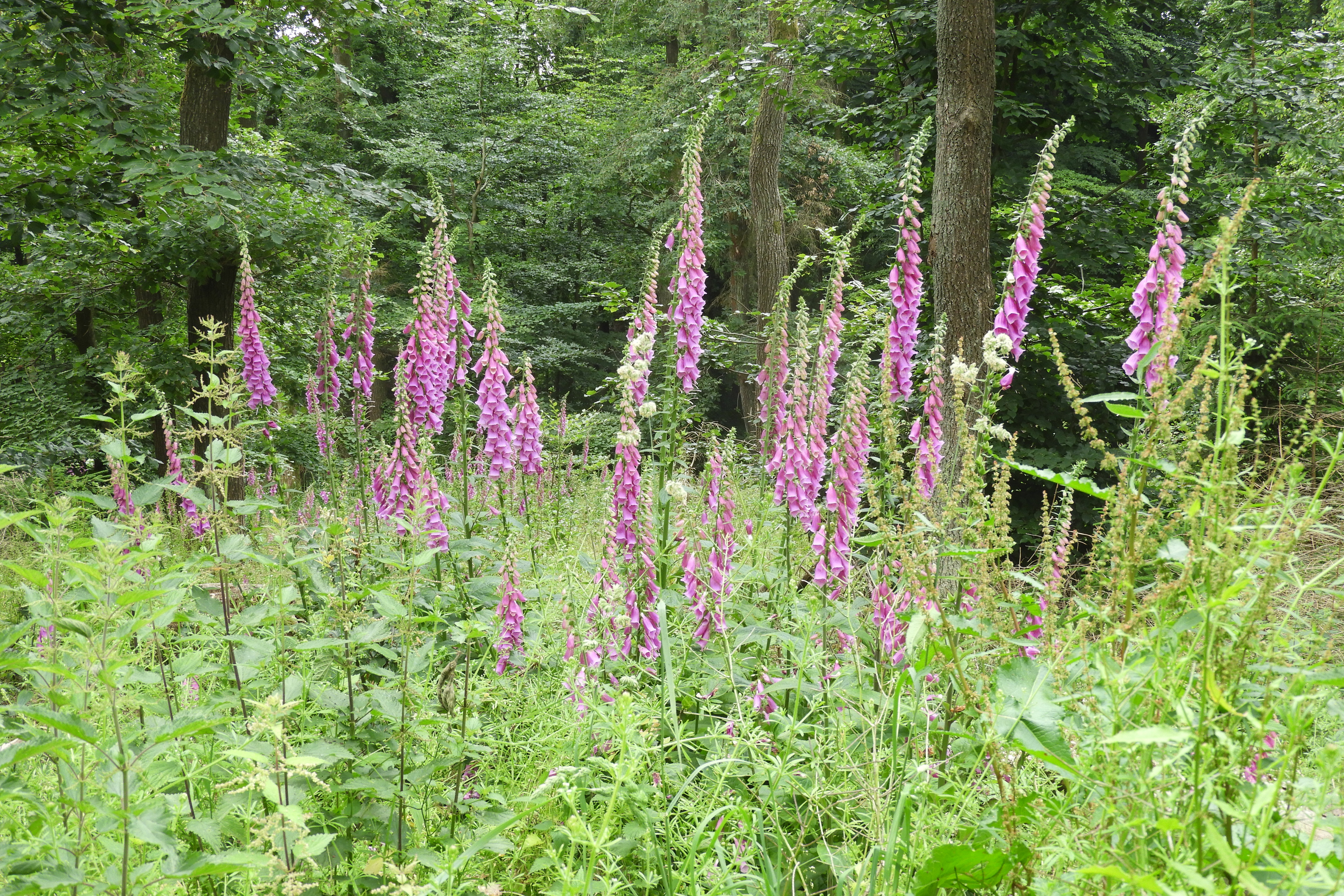 Das Naturschutzgebiet und Natura 2000-Gebiet liegt in den Gemarkungen der Gemeinden Lindewerra und Bornhagen der Verwaltungsgemeinschaft Hanstein-Rusteberg im thüringischen Landkreis Eichsfeld. Es befindet sich innerhalb des Bundsandsteingebiets des Höhebergs. Das Naturschutzgebiet hat die thüringeninterne Kennung 194 und den WDPA-Code 164048. Als FFH-Gebiet hat es in Thüringen die Nummer 16, die europäische Gebietsnummer 4625-303 und den WDPA-Code 555519946. Es liegt vollständig im EU-Vogelschutzgebiet „Werrabergland südwestlich Uder“ mit der Gebietsnummer 4626-420, der thüringeninternen Nummer 12 und dem WDPA-Code 555537539.